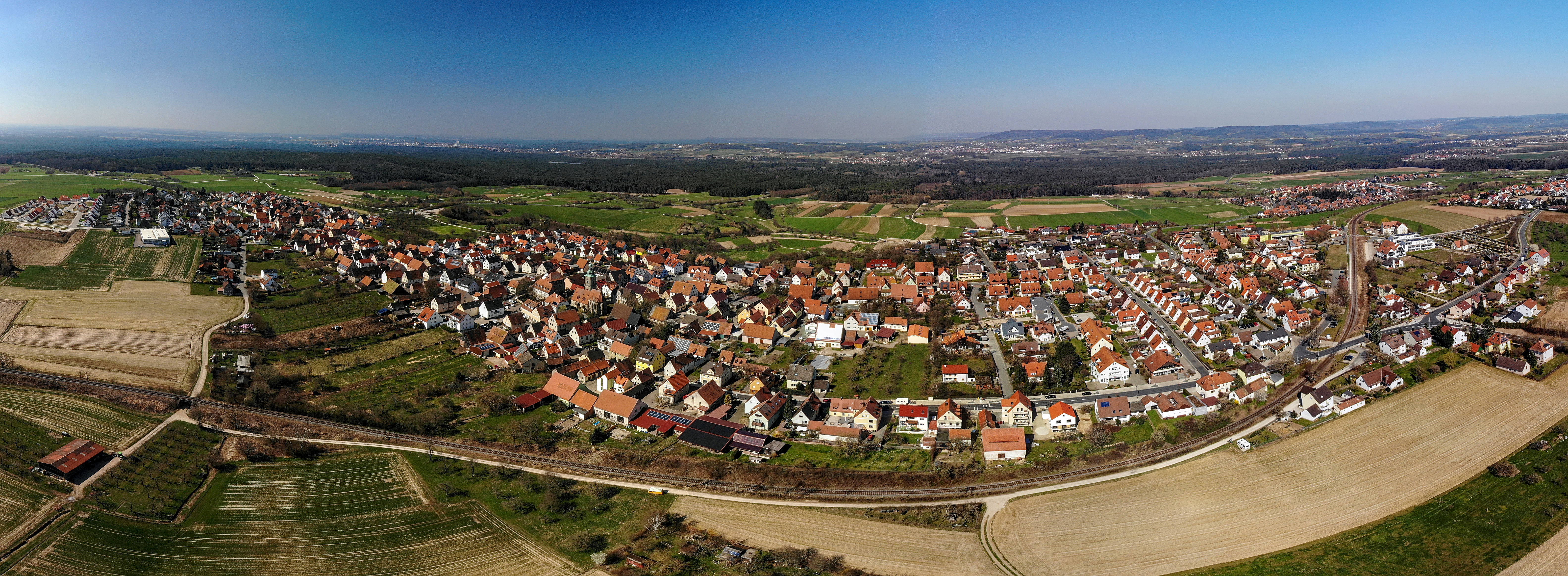 Kalchreuth Panorama Luftaufnahme (2020)